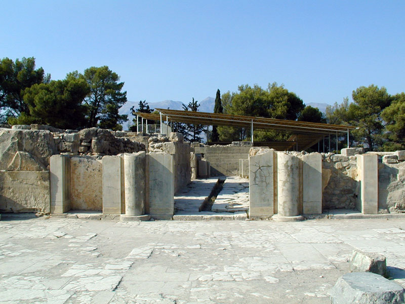 Entrée de l'aile principale du palais de Phaistos, Crète. Photographie prise par Marsyas 13:10, 28 October 2005 (UTC)